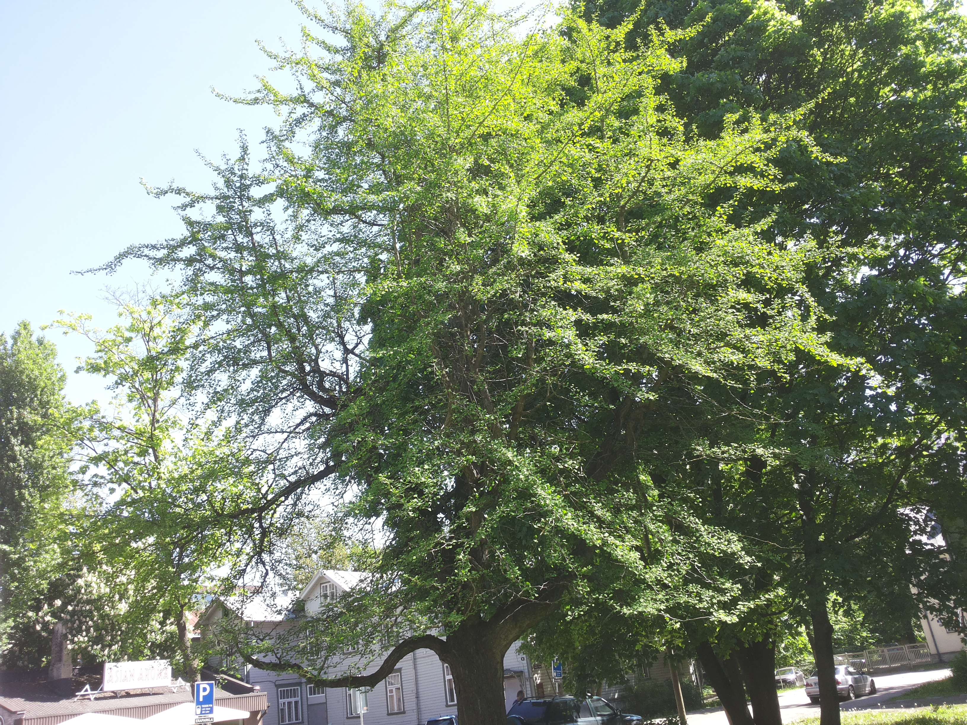 Hõlmikpuu